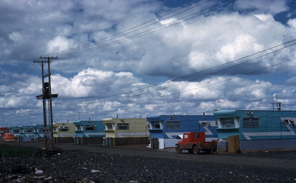 Diapositive couleur illustrant des maisons mobiles de travailleurs à la municipalité de Schefferville dans la région administrative de la Côte-Nord.